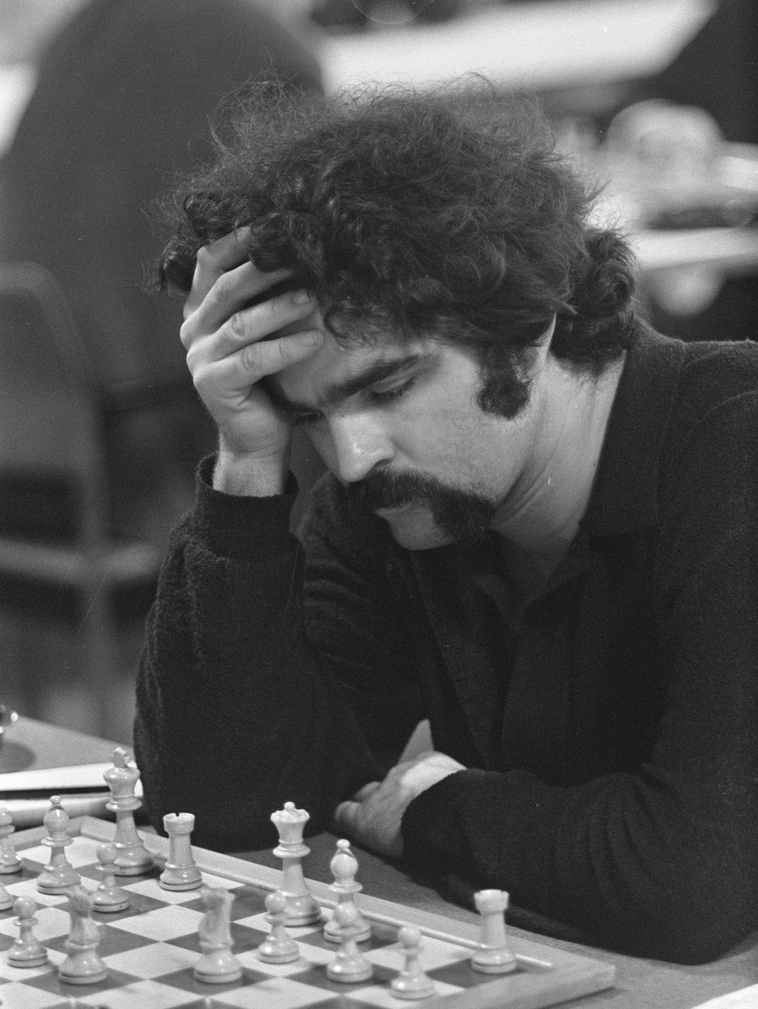 Hoogoven Schaaktoernooi 1969 : Tim Krabbé.